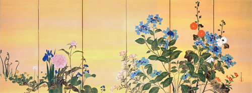 『四季草花図屏風』六曲一双